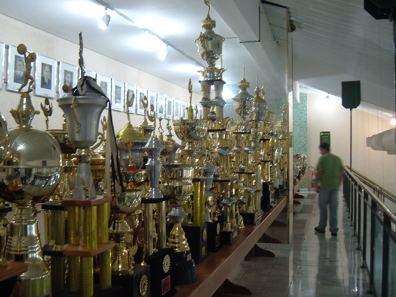 Trofeus conquistados pelo Palmeiras em esportes amadores